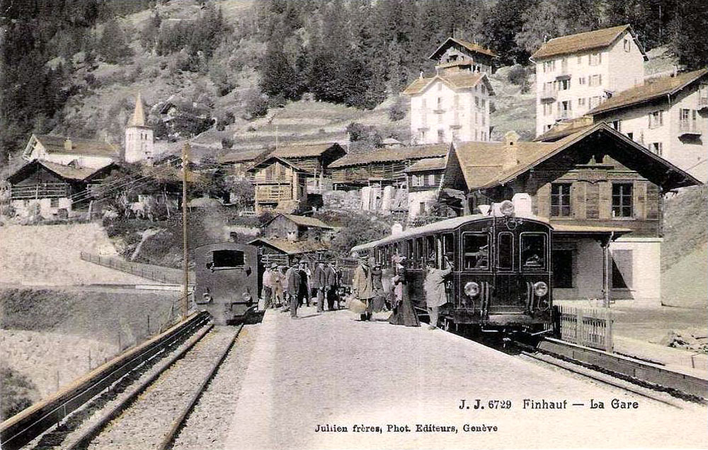 La gare de Finhaut, Valais, Suisse.